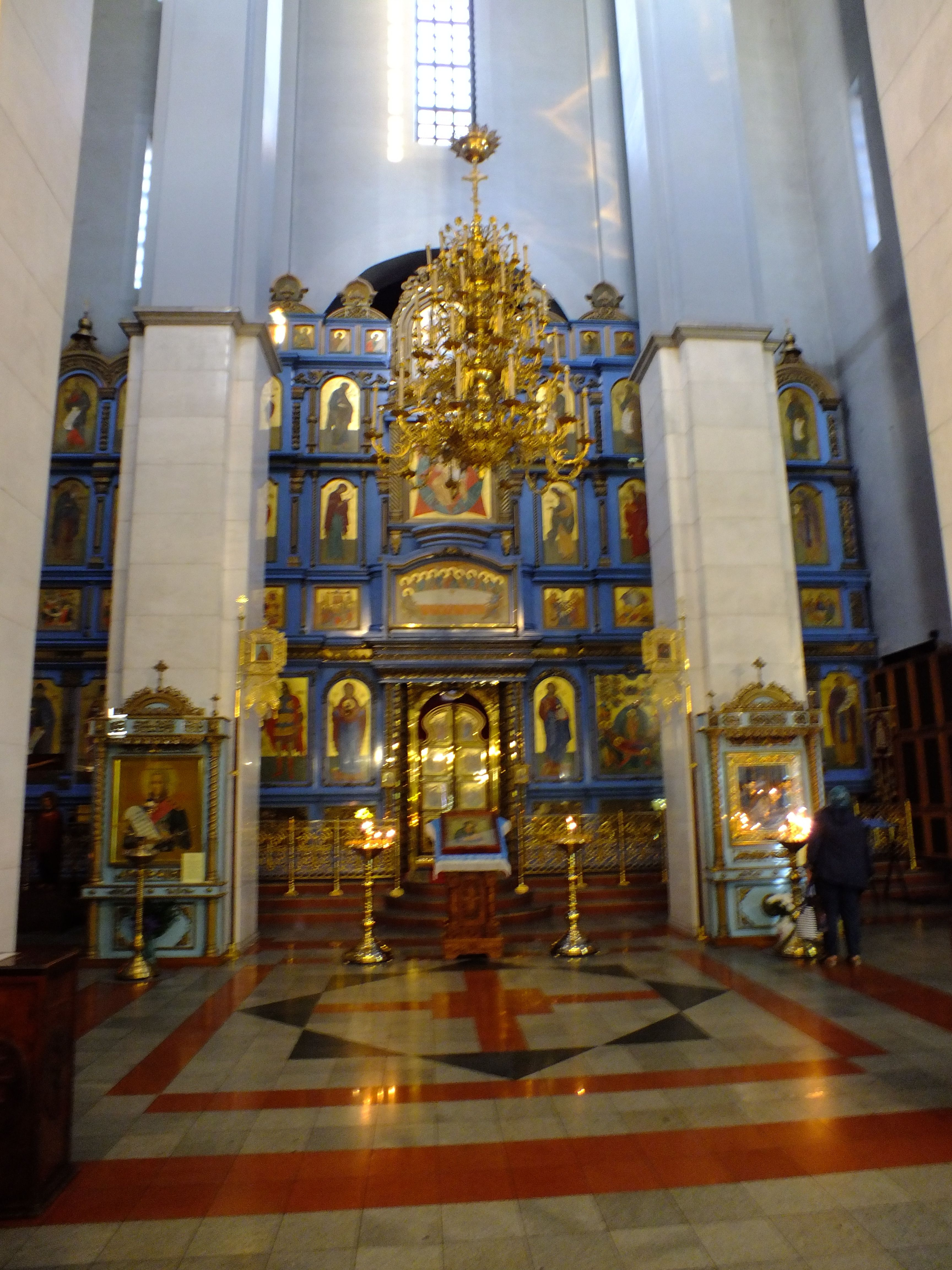 Church of the Dormition of the Theotokos (Khabarovsk)